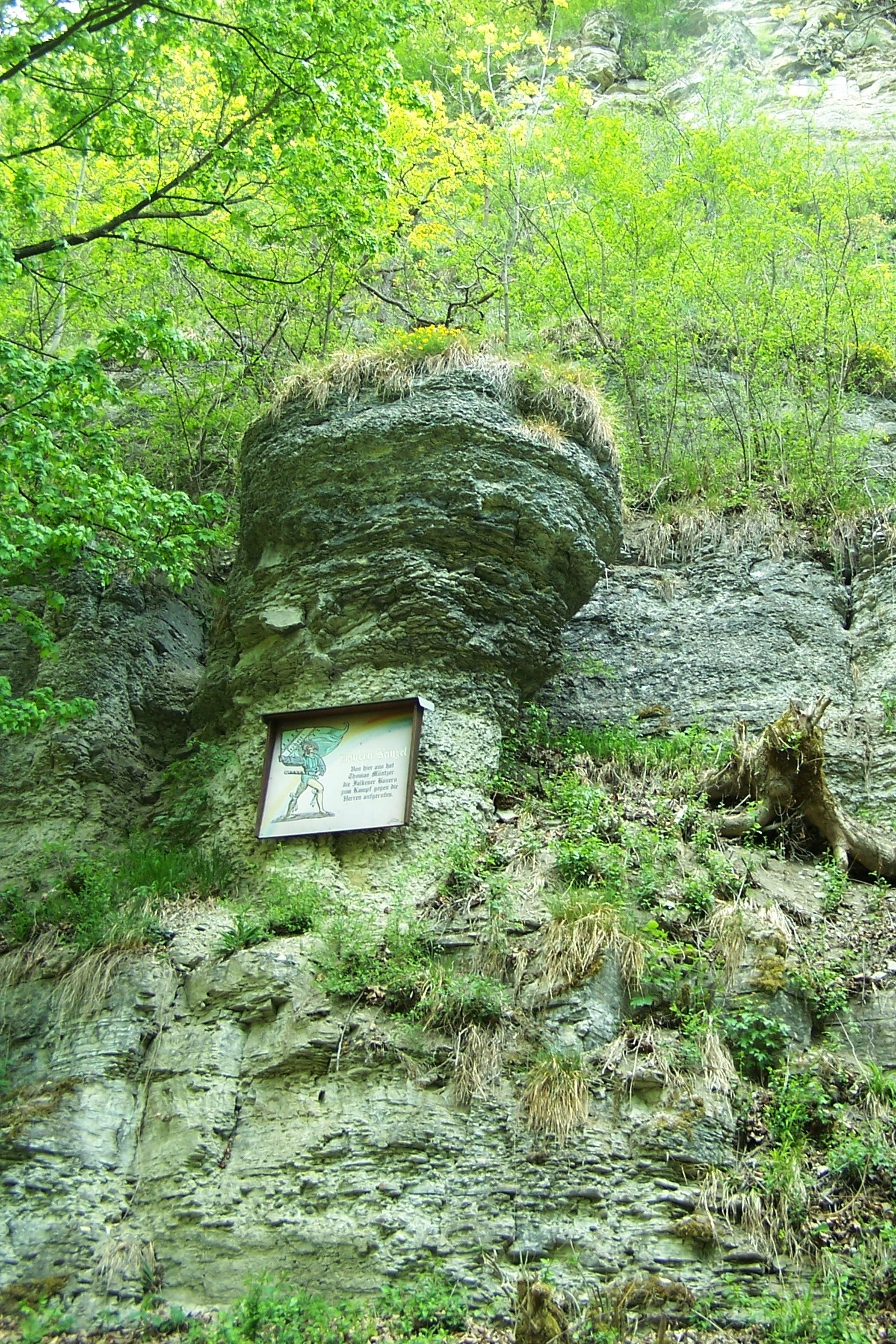 Die sogenannte Bauernkanzel bei Probsteizella in den Falkener Klippen. Nach der in der DDR-Zeit (Anlass: Bauernkriegsjubiläum) vertretenen These predigte dort der revolutionäre Prediger Thomas Müntzer vor aufständischen Bauern aus dem Werratal.